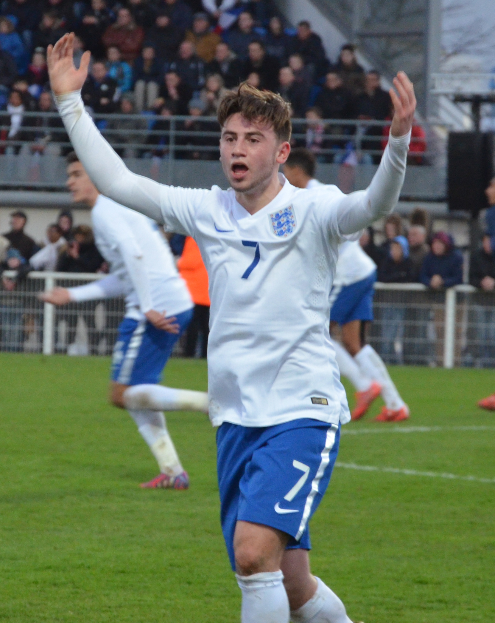 Photographie prise lors du match opposant la France à l'Angleterre pour les qualifications du championnat d'Europe de football des moins de 19 ans 2015 au stade Louis-Villemer de Saint-Lô le 31 mars 2015. Ici, Patrick Roberts.